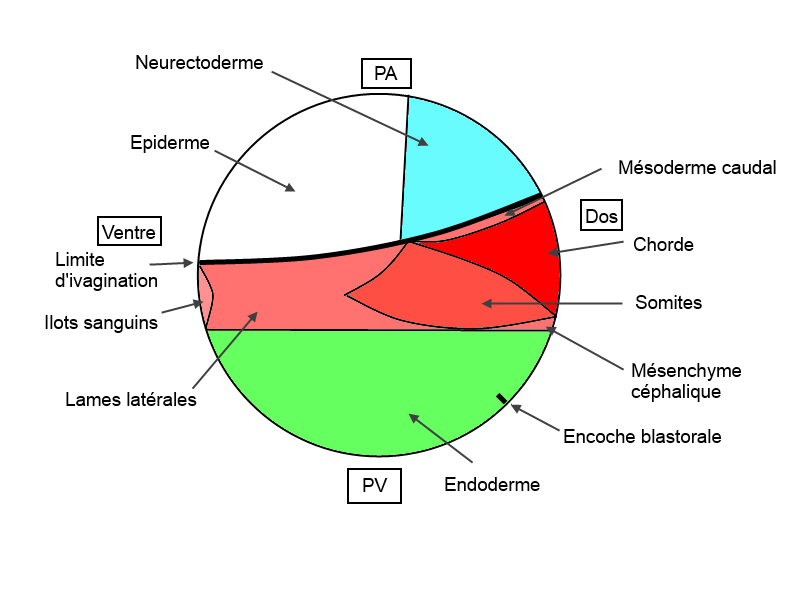 Territoires presomptfis chez le pleurodèle